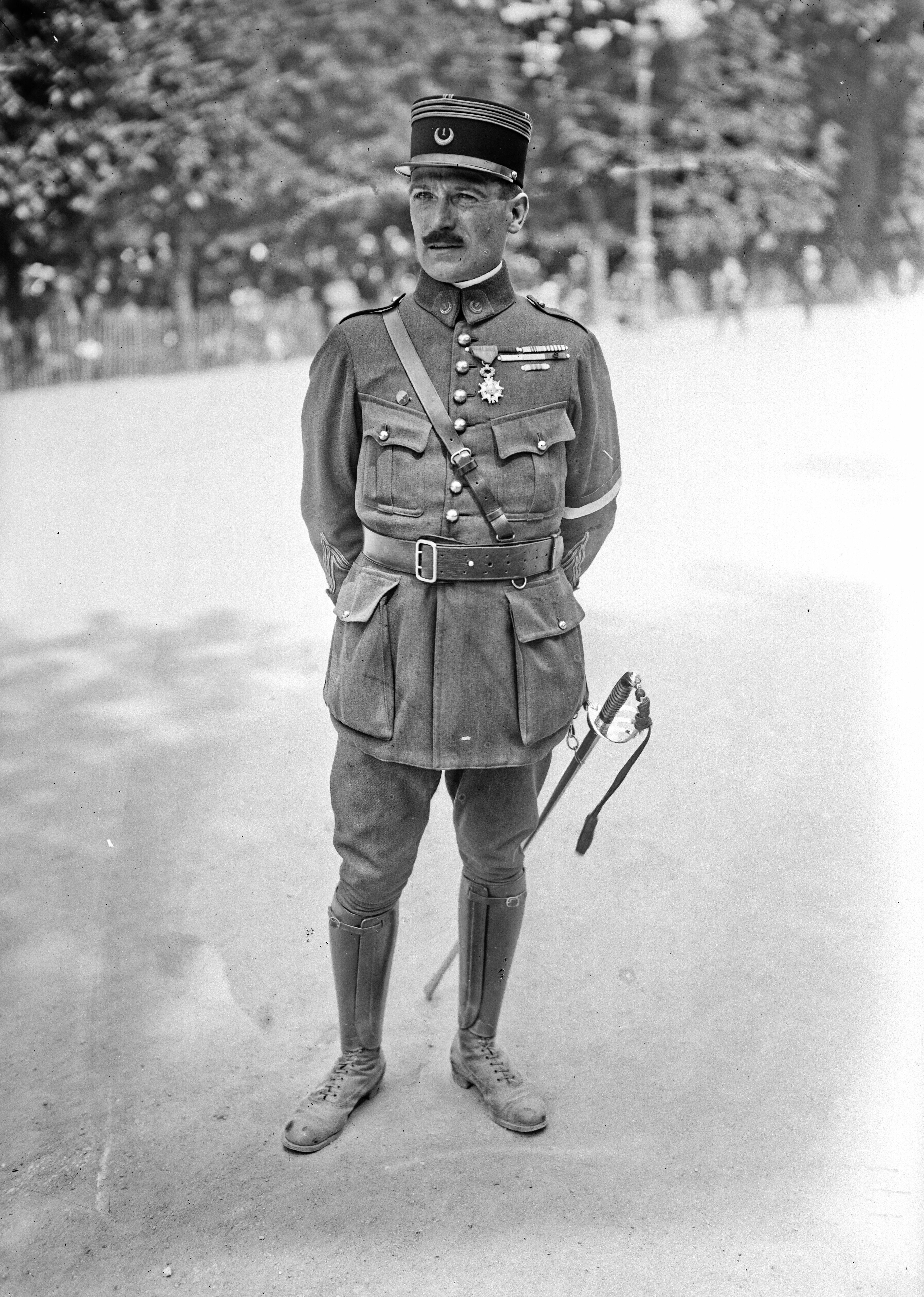 Cne [i. e. un capitaine du 1er régiment de spahis] : [photographie de presse] / [Agence Rol] photogr. nég. sur verre ; 18 x 13 cm (sup.)